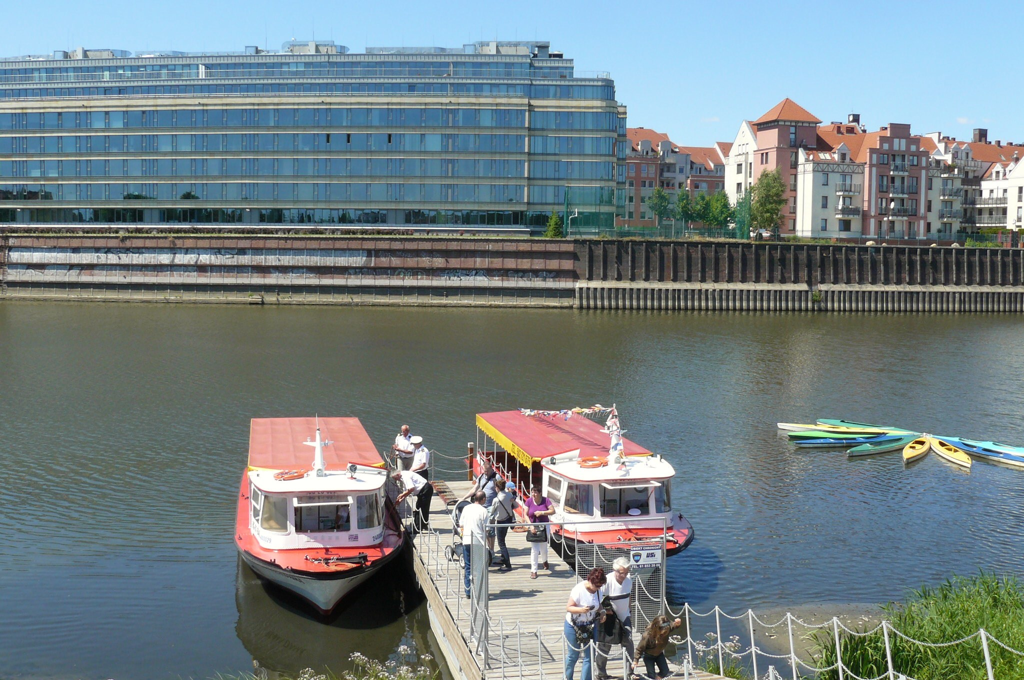 Żegluga na Warcie w Poznaniu latem 2015r.